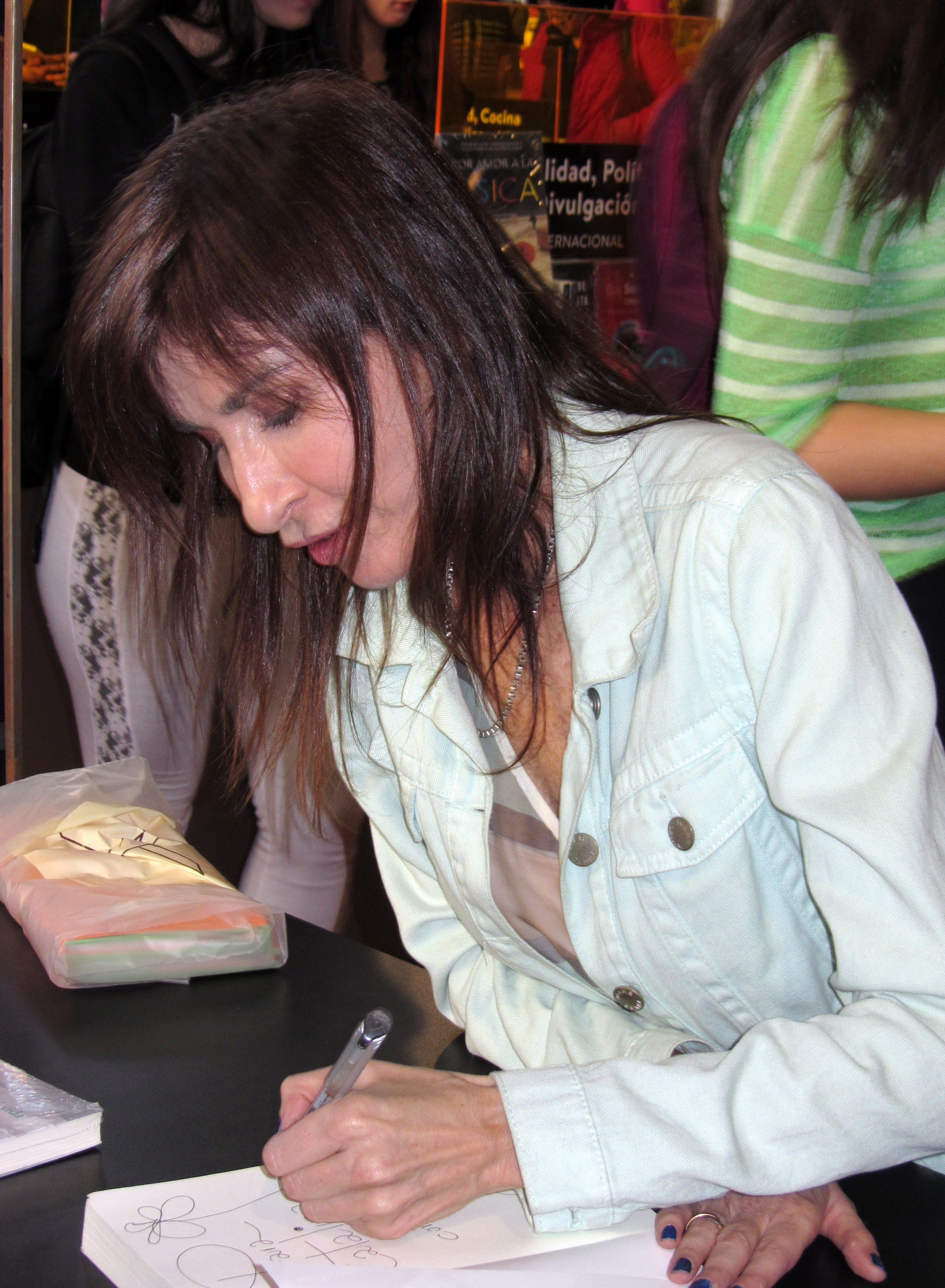 La escritora chilena Carla Guelfenbein en la Feria Internacional del Libro de Santiago 2015